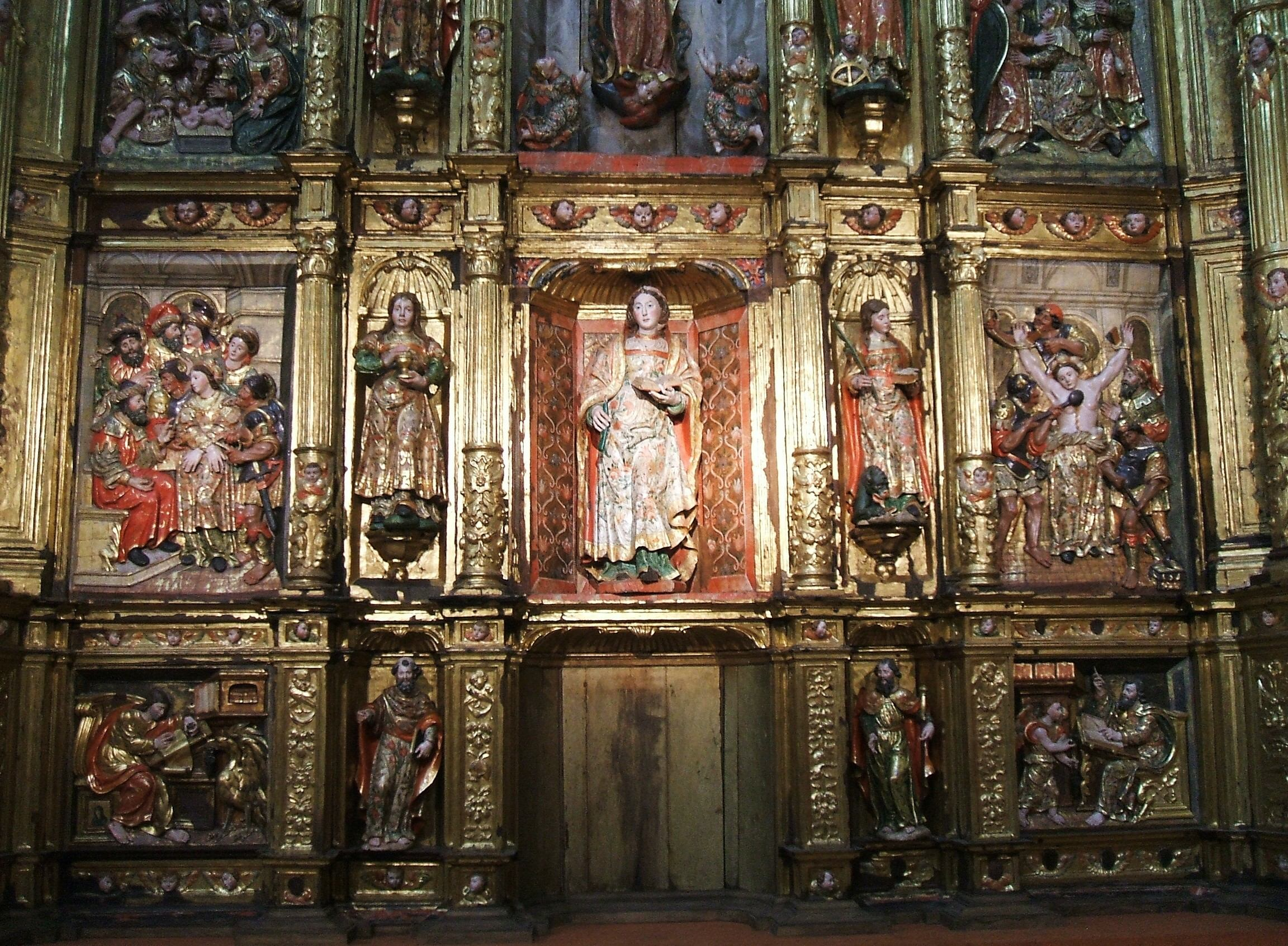 Retablo de Santa Eulalia, procedente de la parroquia homónima del pueblo de Markínez, en el Museo Diocesano de Arte Sacro de Álava, emplazado en la girola de la Catedral Nueva de Vitoria-Gasteiz (País Vasco, España).